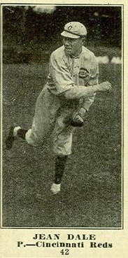 Gene Dale baseball card